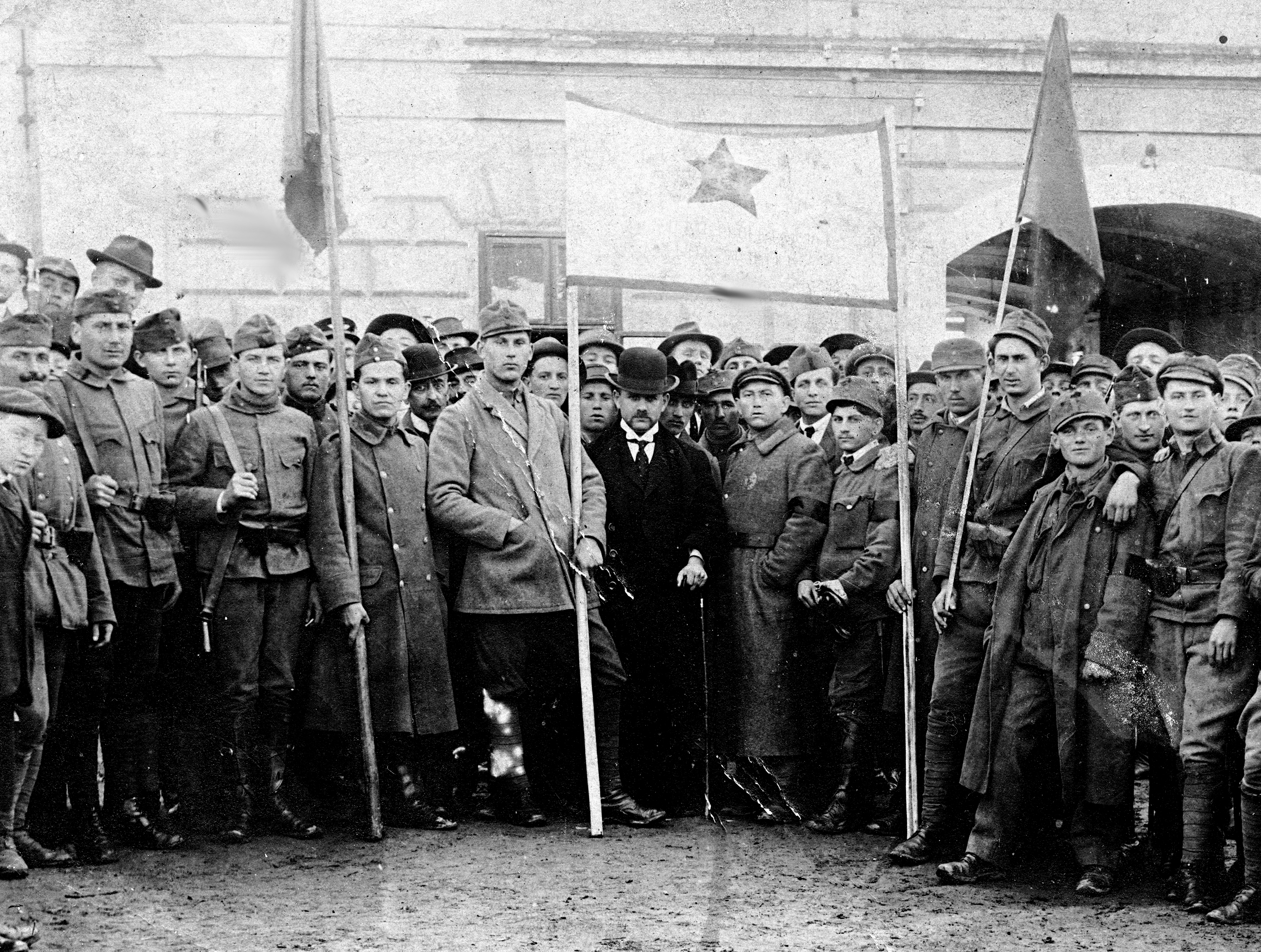 Vöröscsillagosok 1919-ben